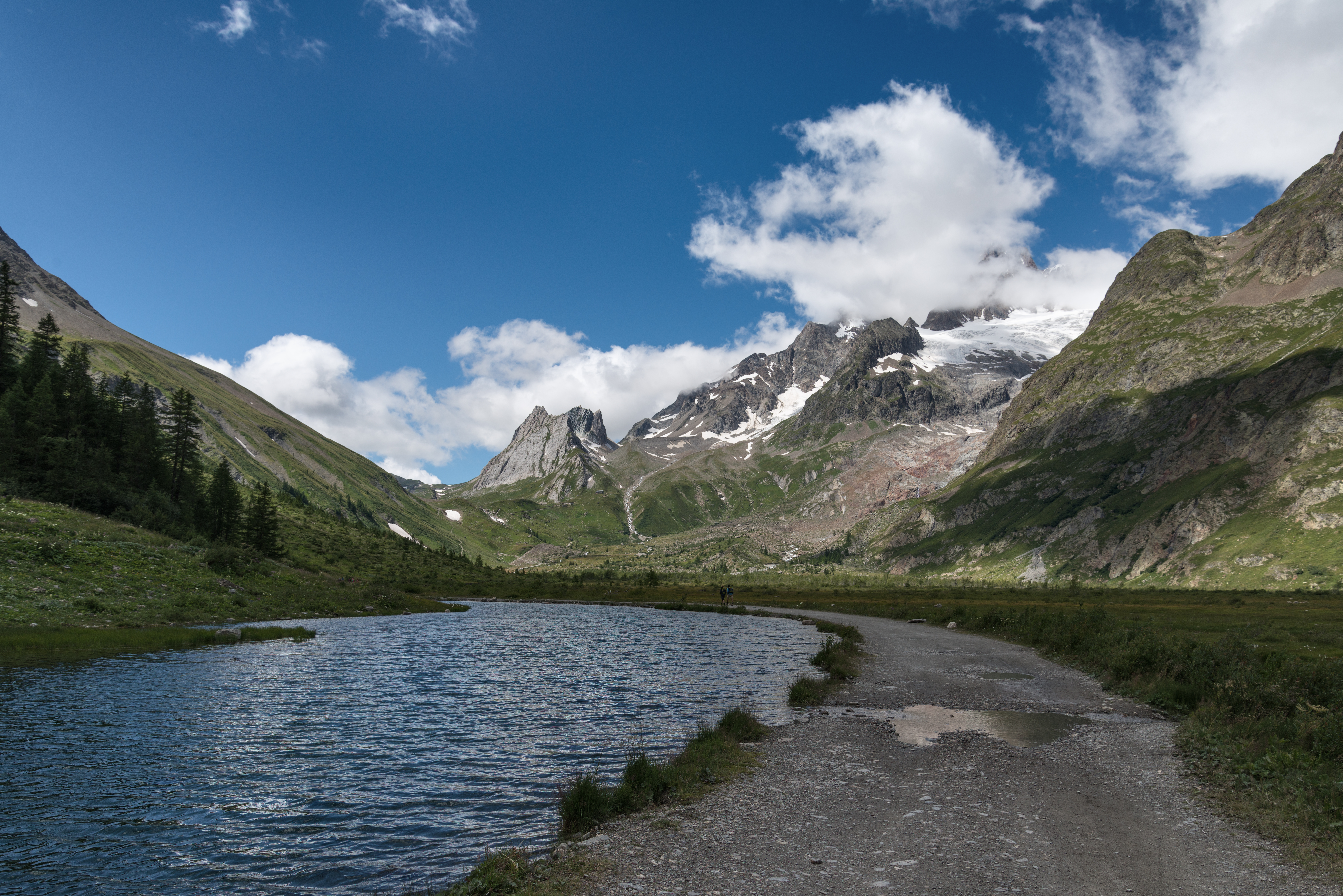 Dora di Veny - Val Veny, Courmayeur, Italia